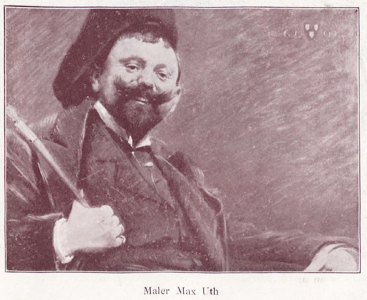 Porträt von Max Uth (1863-1914), deutscher Maler, angefertigt von Georg Ludwig Meyn (1859-1920).